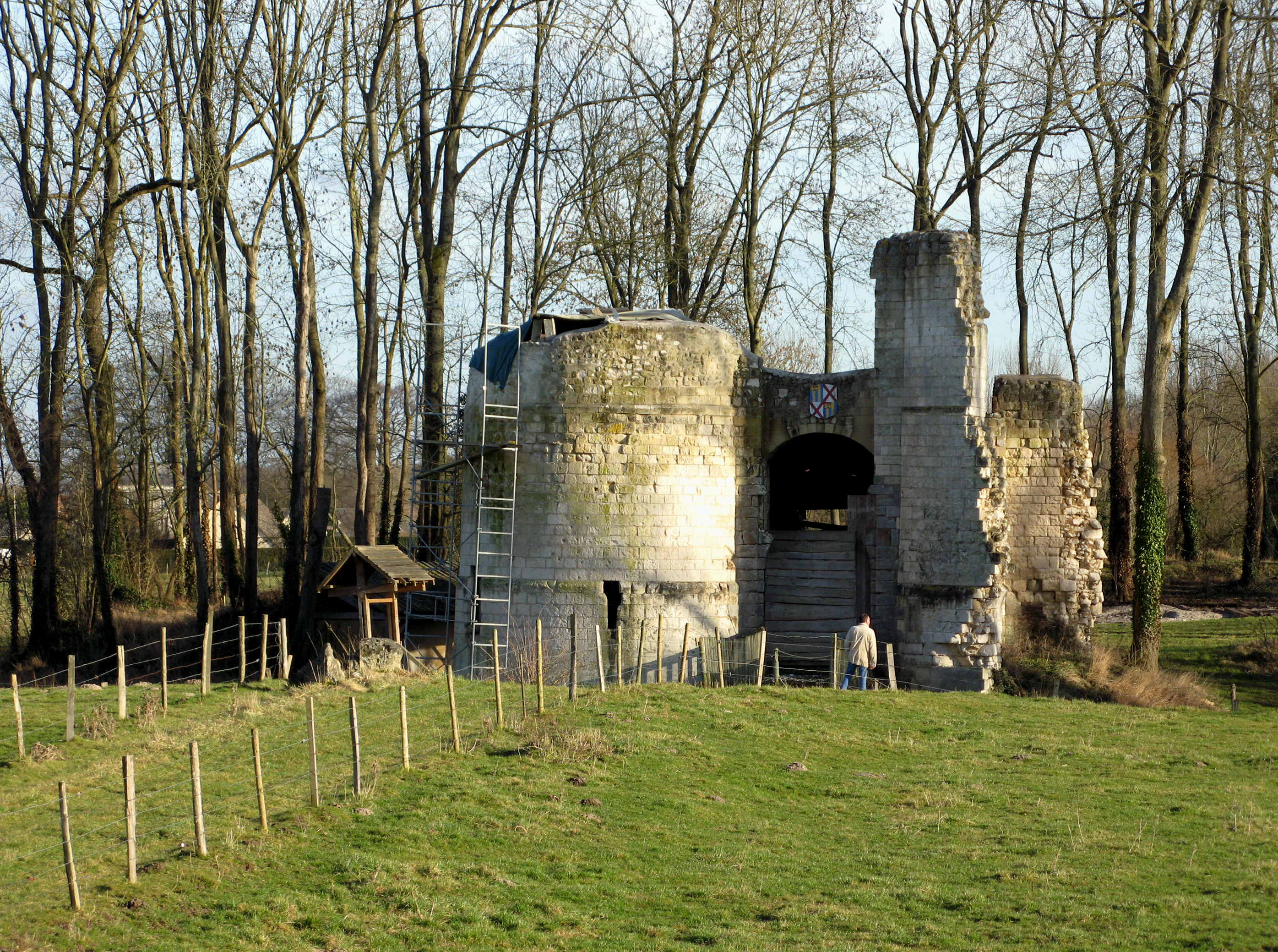 Eaucourt-sur-Somme (Somme, France) - Le château. .